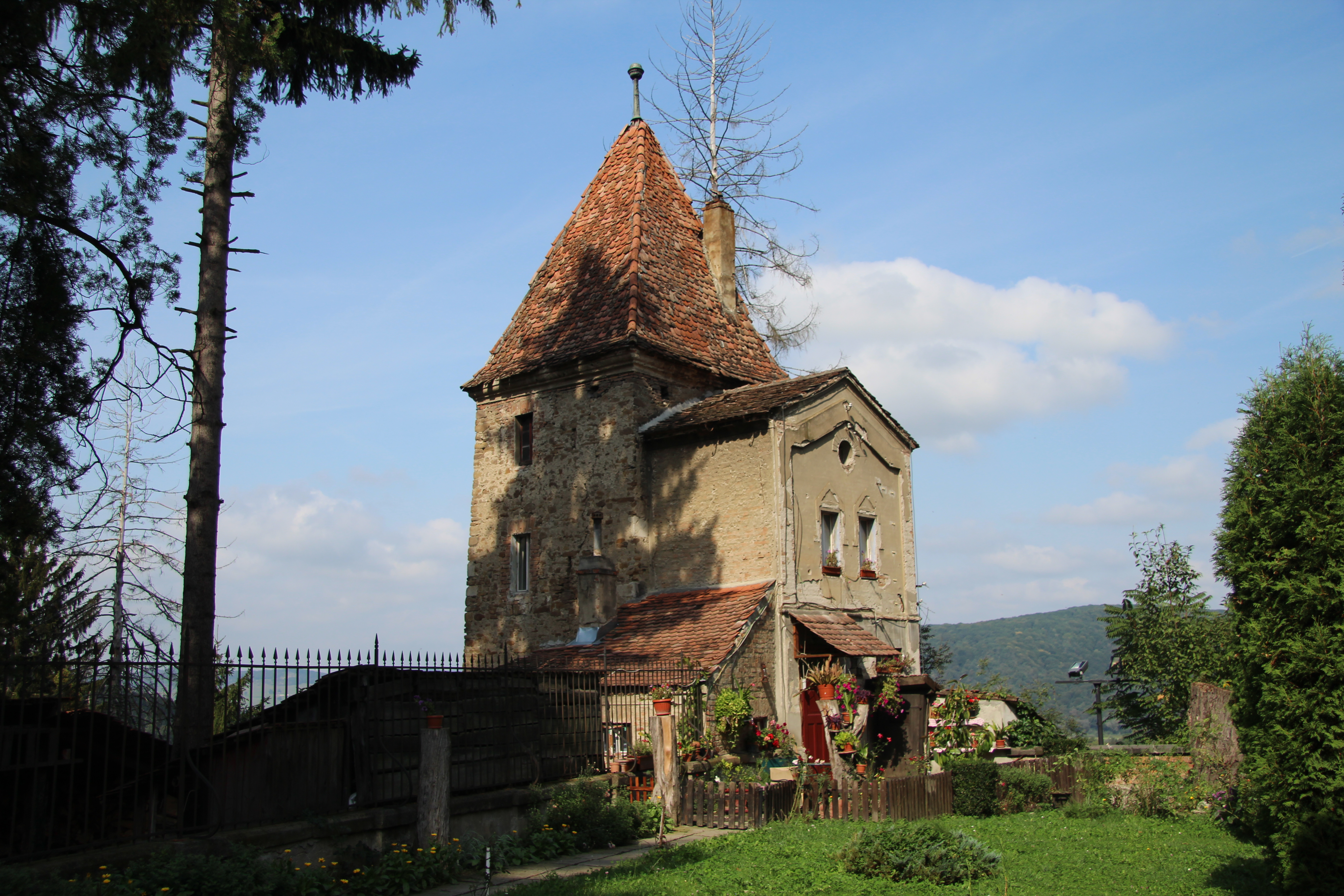 Seilerturm, Haus des Friedhofswärters in Schäßburg